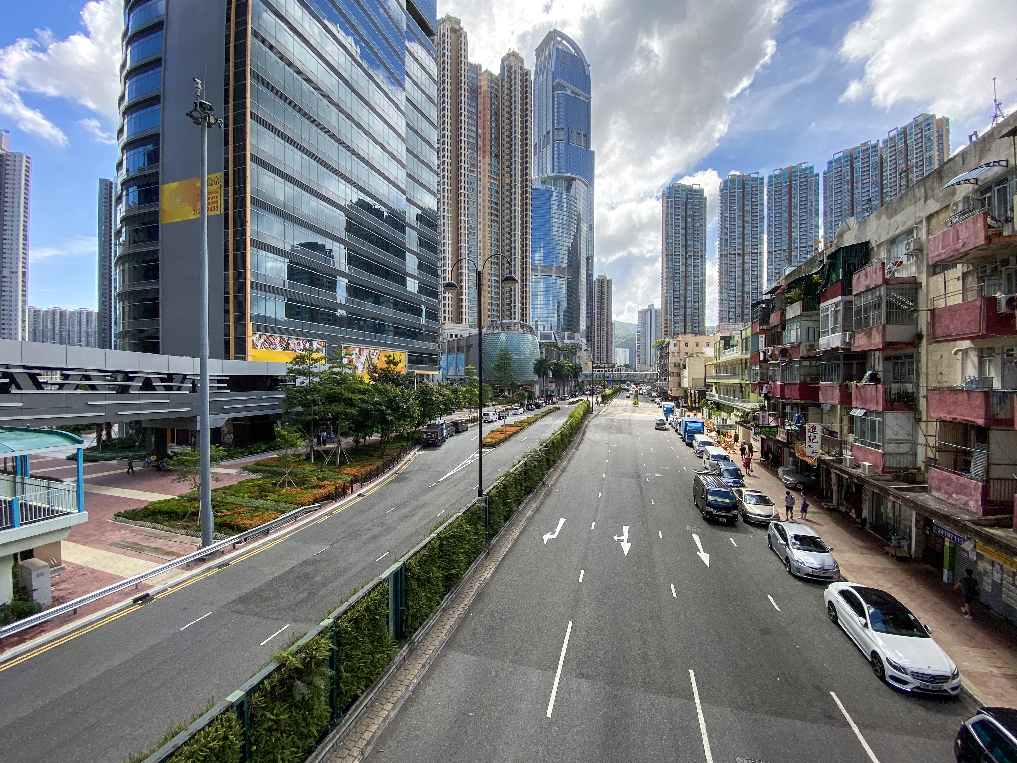 Yeung Uk Road